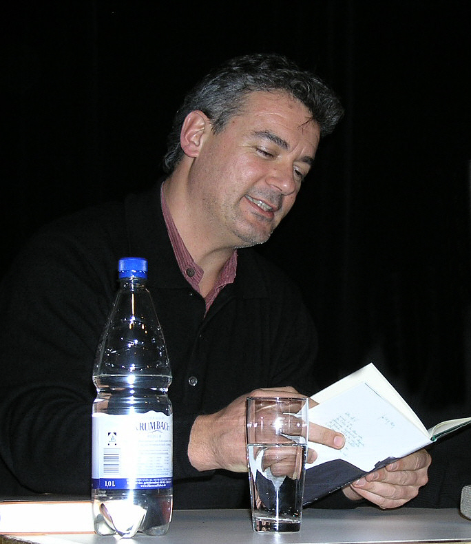 Ilija Trojanow bei einer Lesung in Langenau/Württ am 31. Januar 2007 Ilija Trojanow reading from his books in Langenau/Württ on January 31, 2007 Date: 31 January 2007